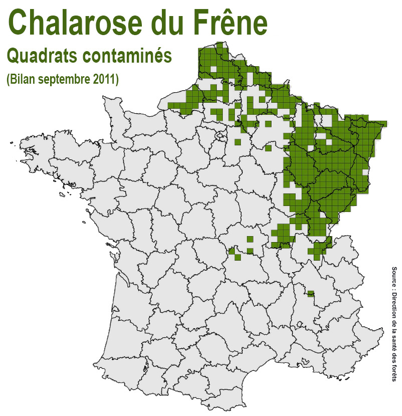 Chalarose du Frêne en 2011 [méthode des quadrats, source : DSF (Département de la santé des forêts, ministère en charge de l'Agriculture et des forêts) ]. Cette maladie touche deux espèces au sein de la même essence : Fraxinus excelsior et Fraxinus angustifolia.